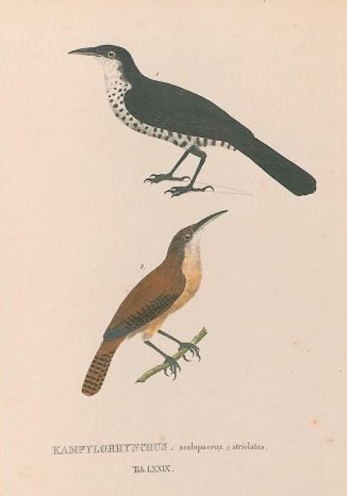 Campylorhynchus turdinus = Sym: Campylorhynchus scolopaceus (Abbildung 1) Cantorchilus longirostris = Syn: Campylorhynchus striolatus (Abbildung 2)